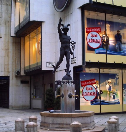 Merkúr szobor a Váci utcában (Budapest)